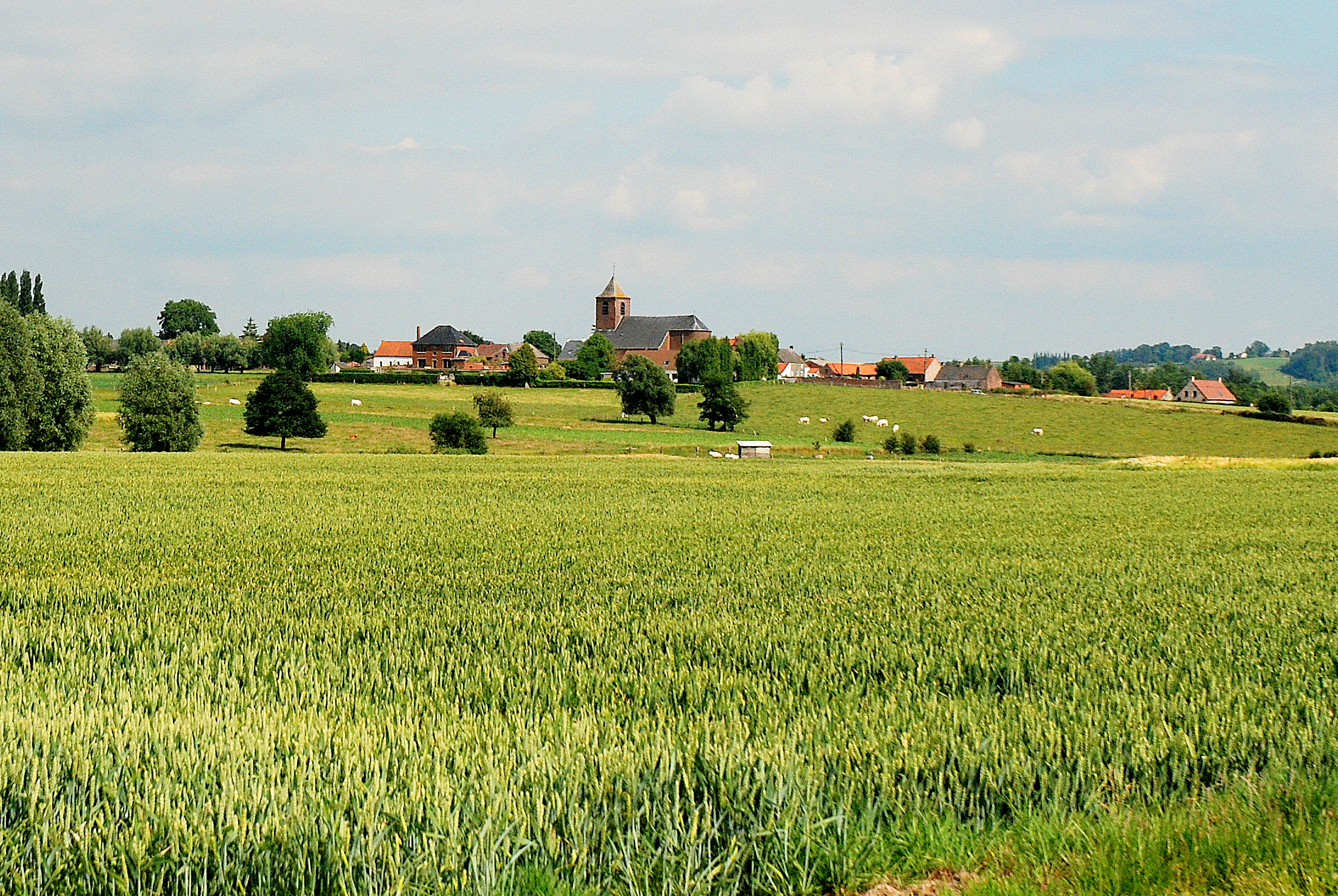 le village de Dergneau dans la province du Hainaut en Belgique